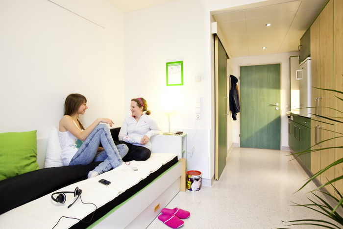 Einzelzimmer